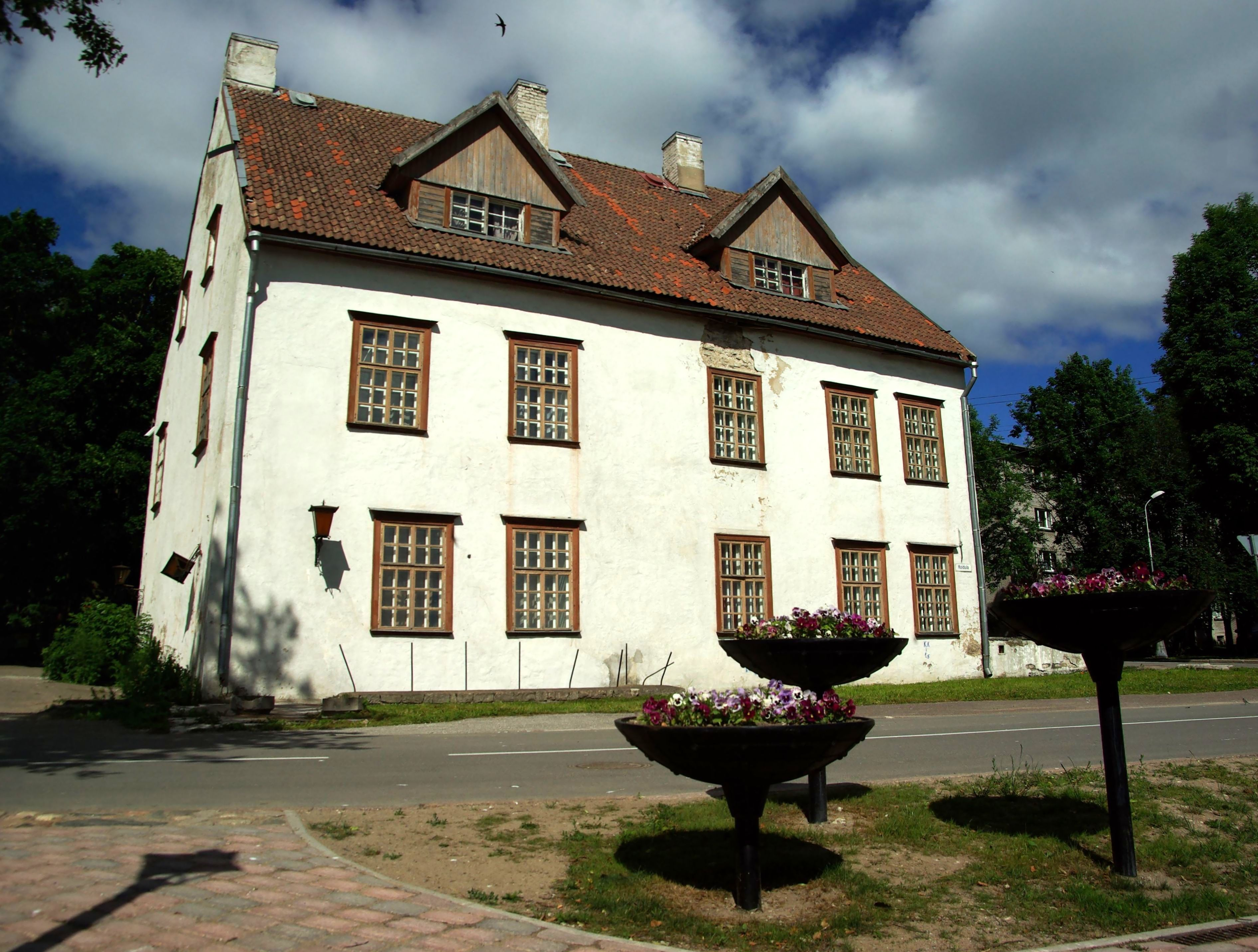 Elamu Narvas Koidula t. 6, 17.saj.,1982